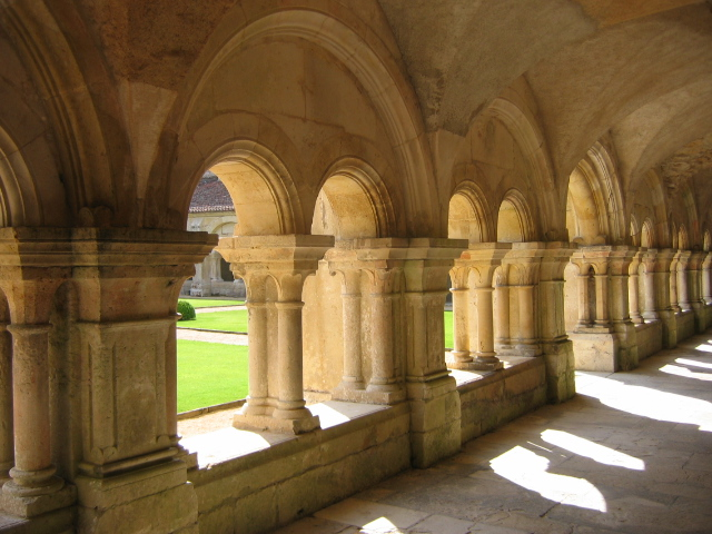 Abbaye de Fontenay, France : cloître.